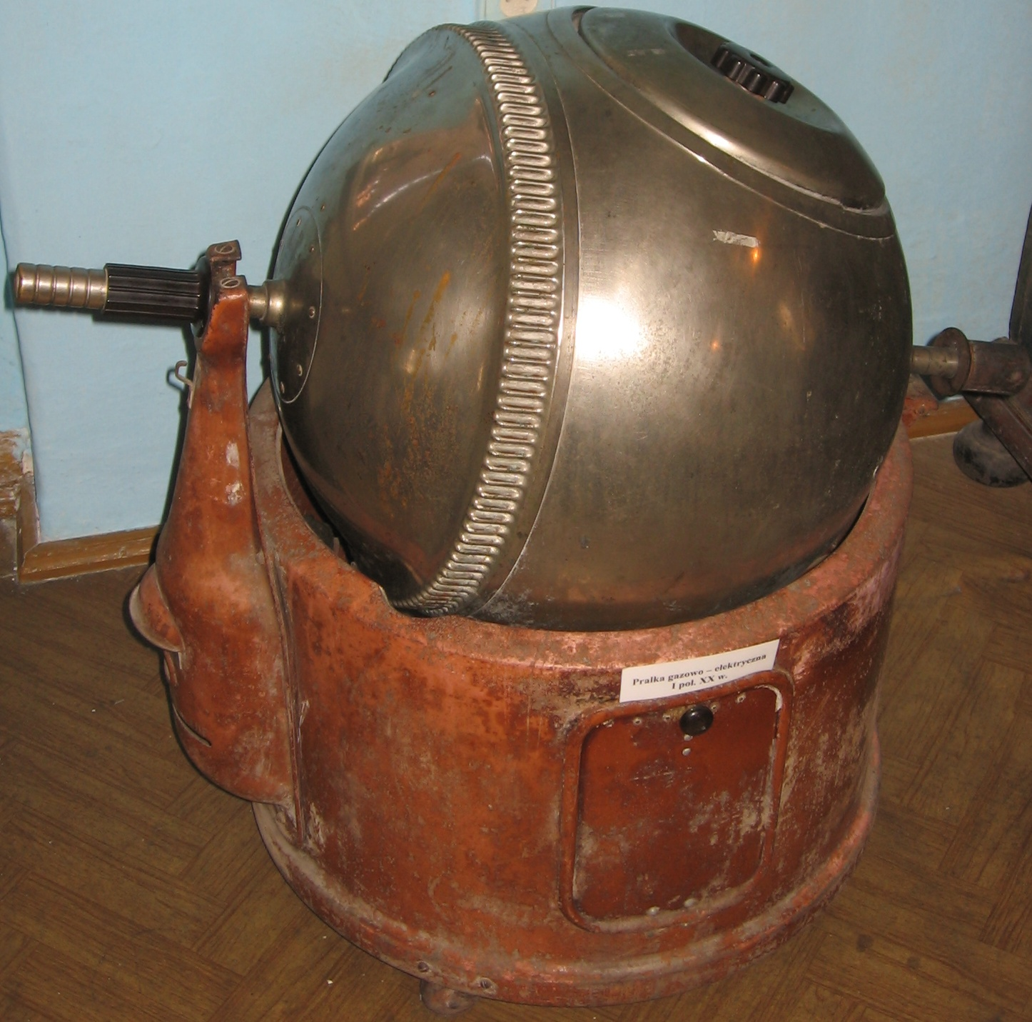 pralka gazowo-elektryczna z I połowy XX wieku ze zbiorów Muzeum Gospodarstwa Domowego w Ziębicach